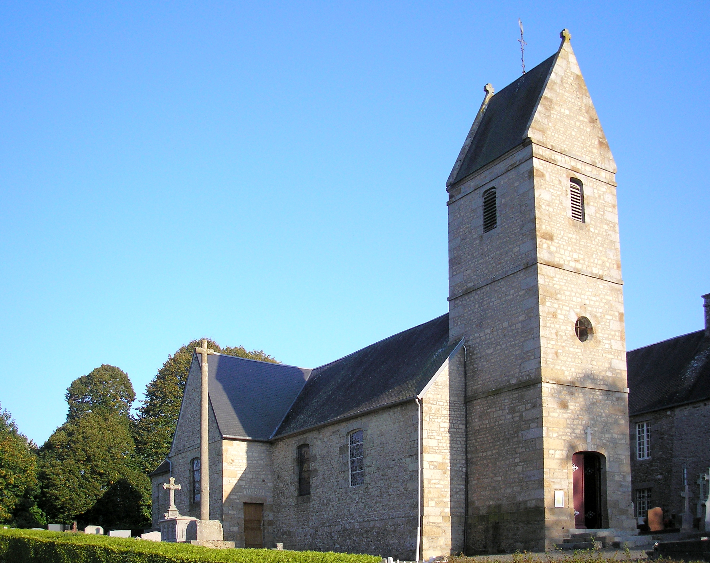 Saint-Nicolas-des-Bois (Normandie, France). L'église Saint-Nicolas.